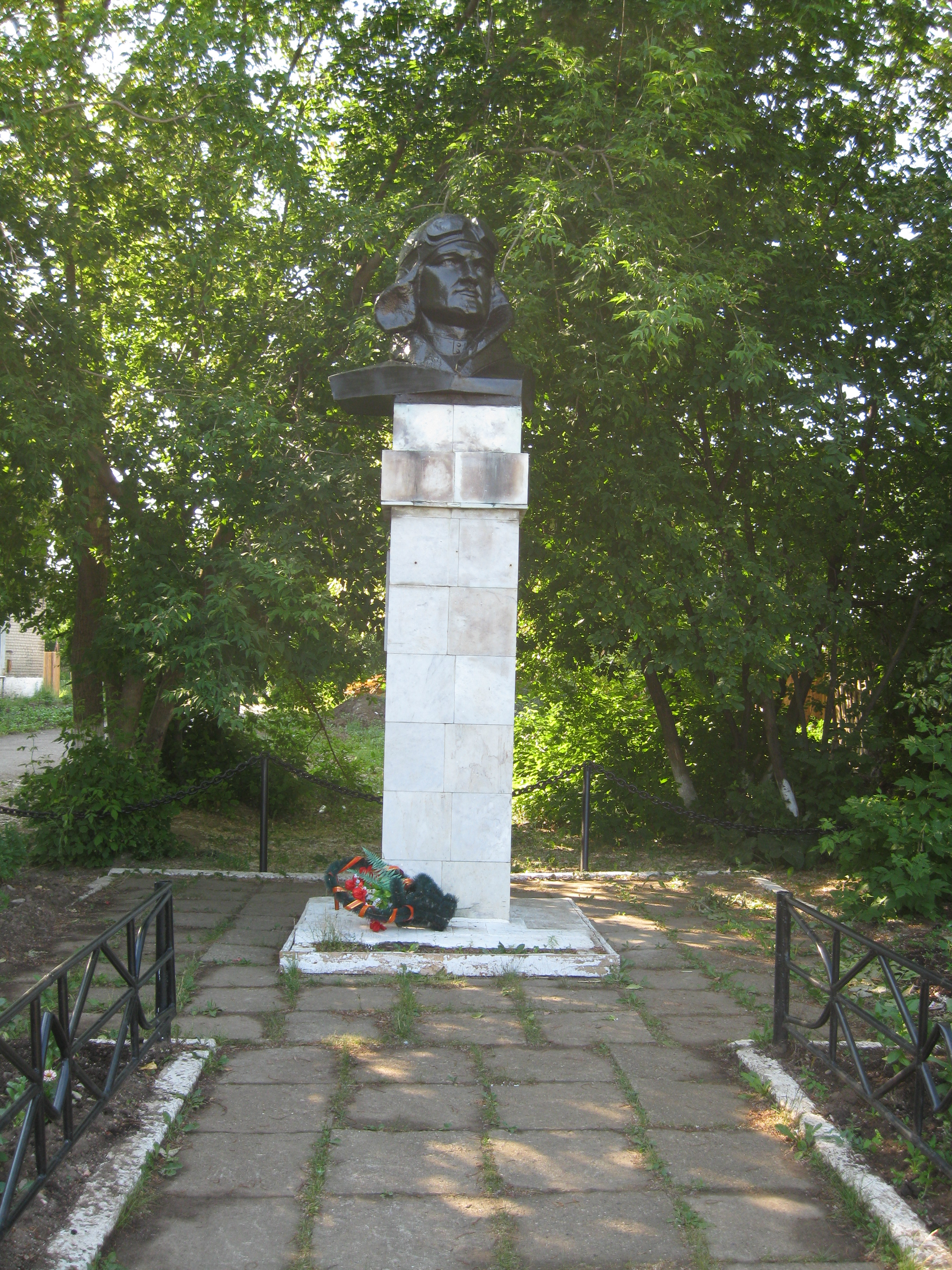 Памятник Герою Советского Союза Францеву Евгению Ивановичу в городе Чернушка возле Кадетской школы (шк.№9).